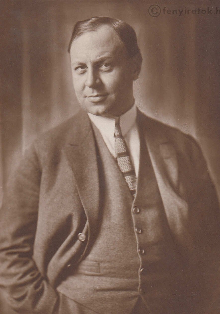 Emil Jannings (1884-1950) német színész. Postcard